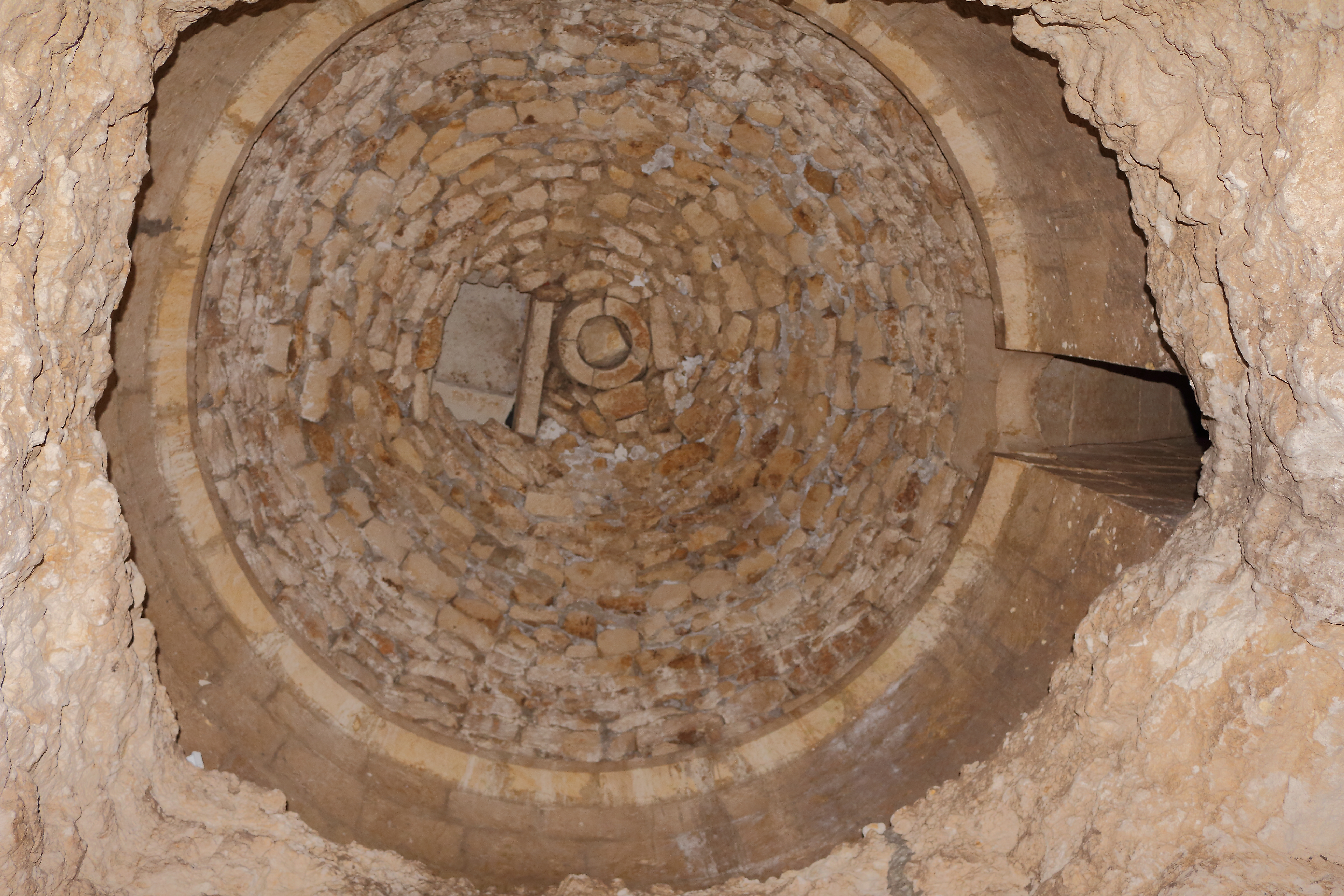 Dôme de la crypte sous l'église Saint-Martin à Meursac, Charente-Maritime, Poitou-Charentes, France. .